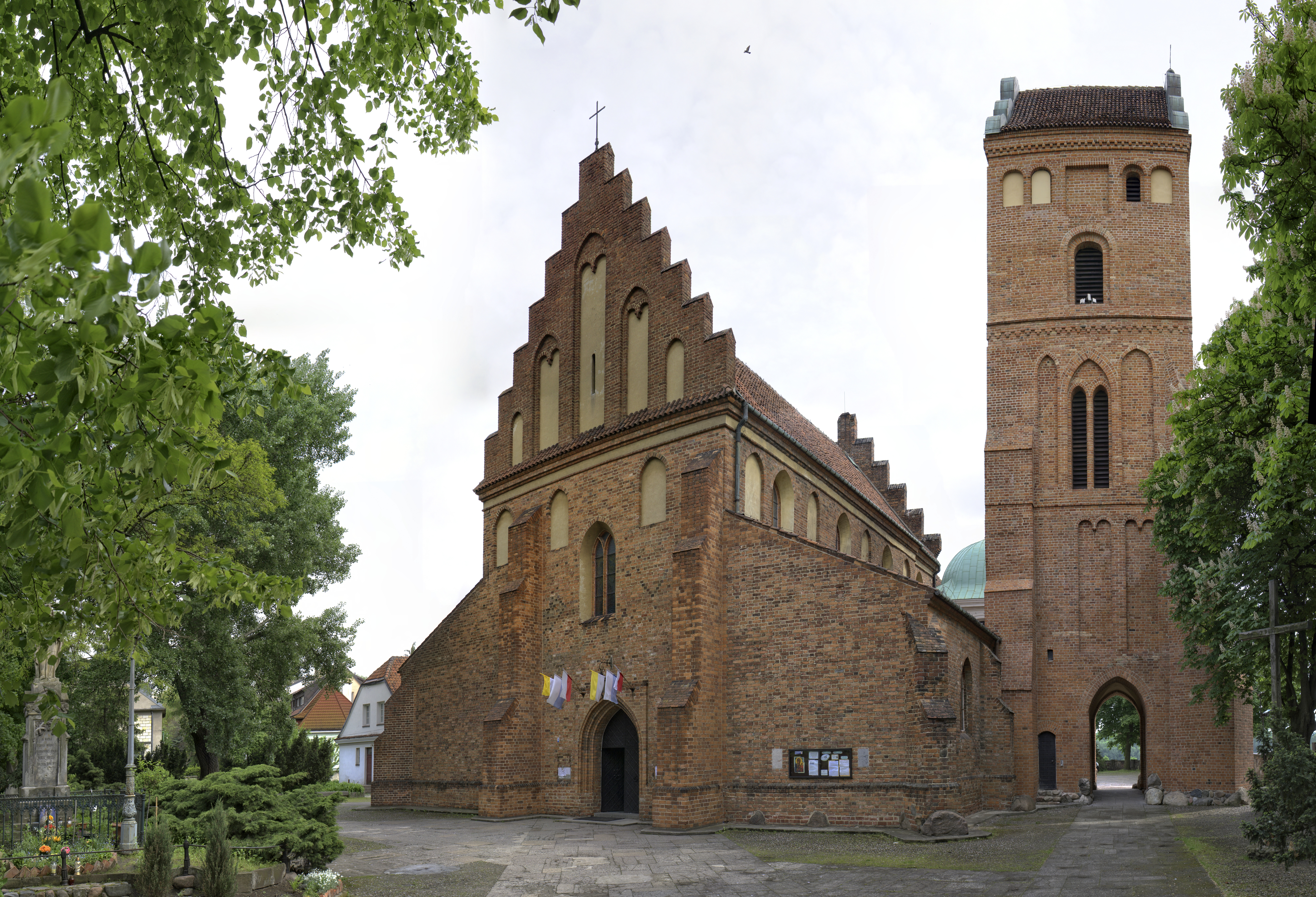 Kościół Nawiedzenia Najświętszej Maryi Panny w Warszawie